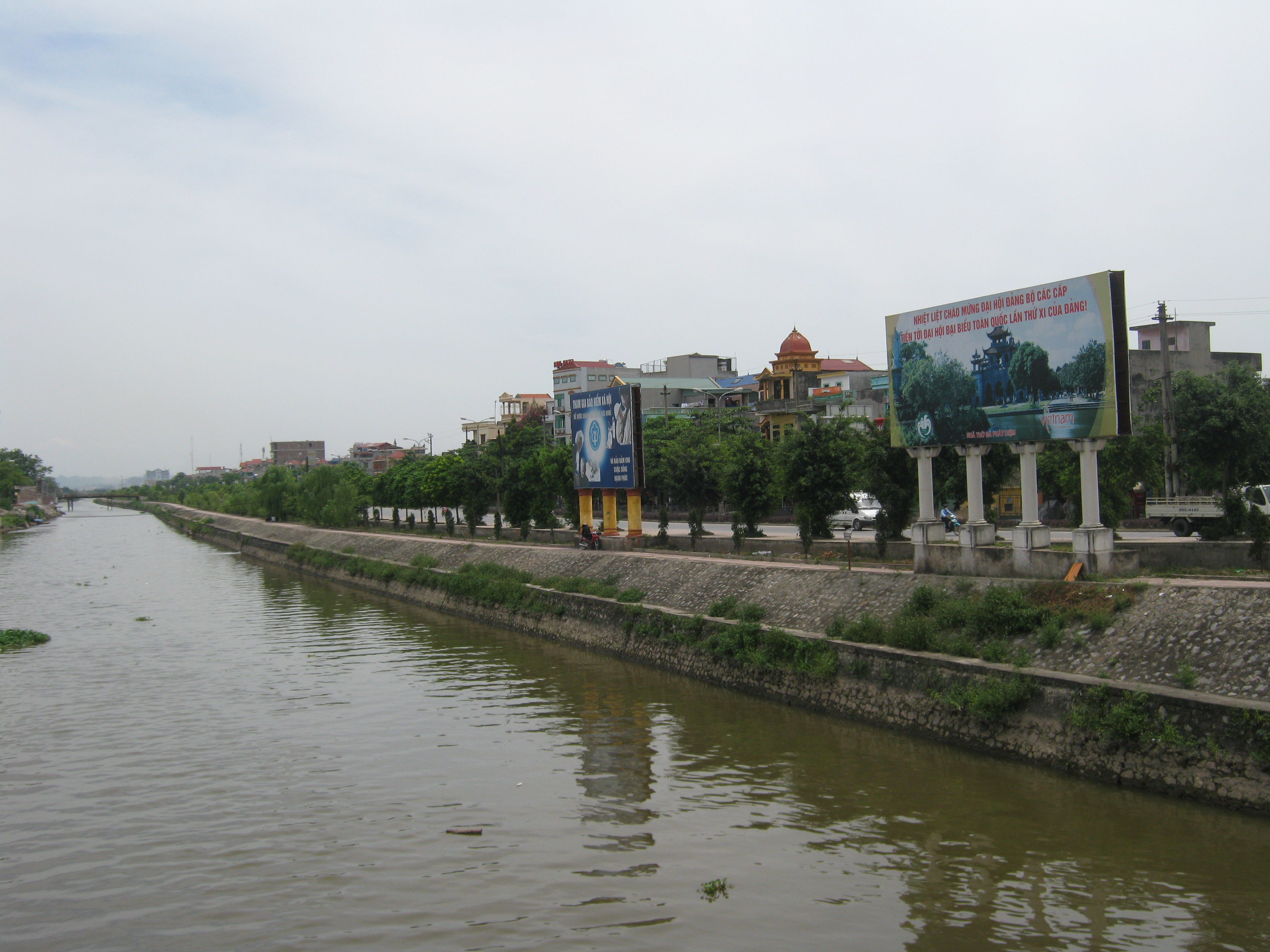 Phong cảnh công viên bờ tây sông Vân.